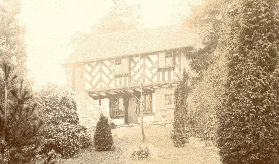 Cwrt Plas yn Dre yn Dolerw, Drenewydd